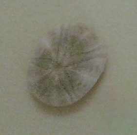 Cassidulus mitis (Kraus, 1954). Acervo de invertebrados marinhos do Museu Nacional/UFRJ - Rio de Janeiro, RJ, Brasil.